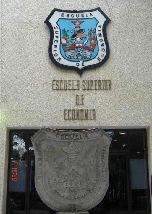 Imagen de dos escudos en la fachada de la Escuela Superior de Economía del Instituto Politécnico Nacional. Se muestra la escultura del escudo inicial así como del escudo en madera el cual colgaba a la entrada del centro educativo.